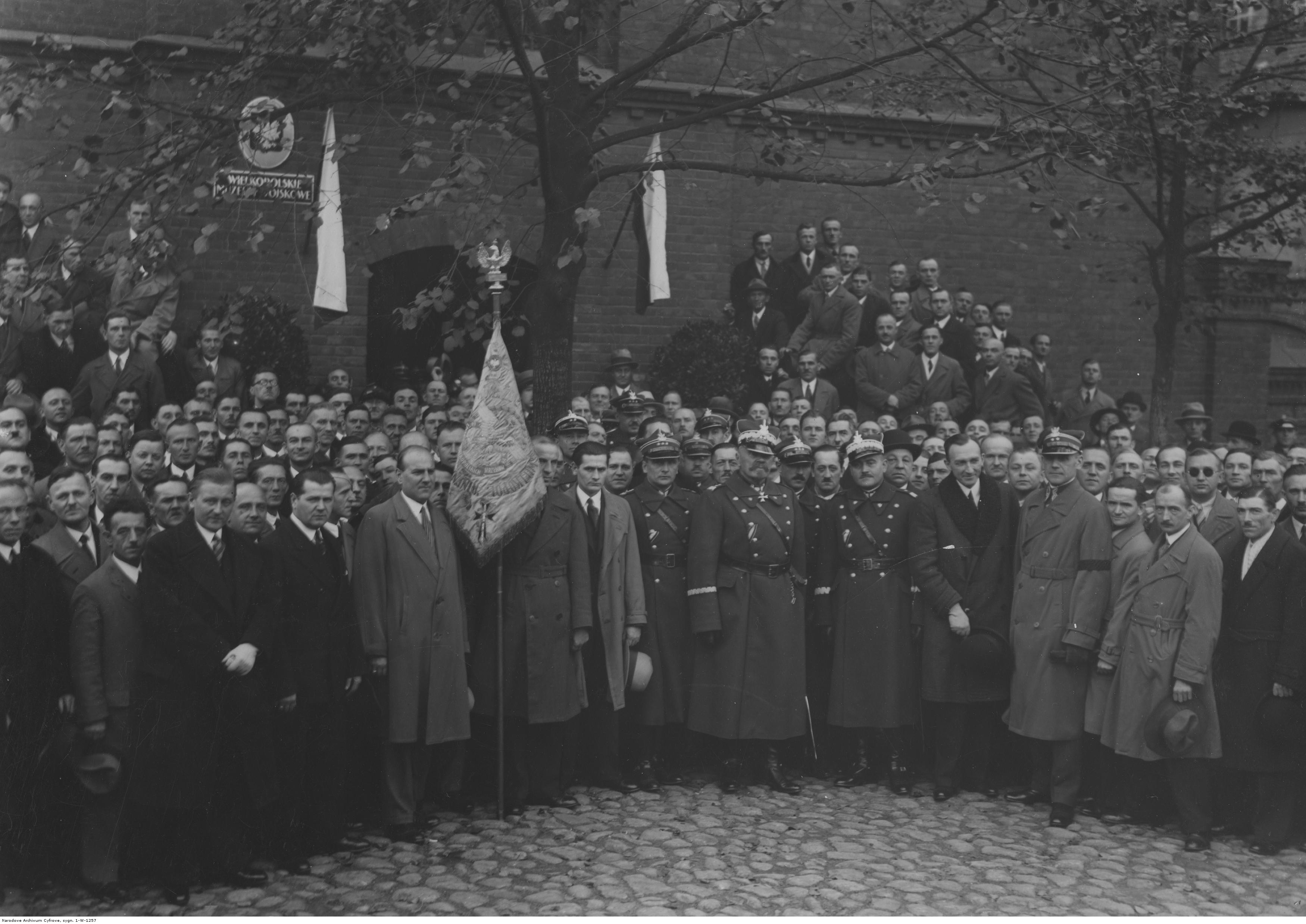 Wręczenie odznaki 14 Dywizji Piechoty 55 pułkowi piechoty w Poznaniu; październik 1934. Fotografia grupowa uczestników uroczystości. W pierwszym rzędzie widoczni m.in. gen. Daniel Konarzewski (6 z prawej), gen. Franciszek Wład (5 z prawej), płk Stefan Grot-Rowecki (7 z prawej). Koncern Ilustrowany Kurier Codzienny - Archiwum Ilustracji. Sygnatura: 1-W-1257